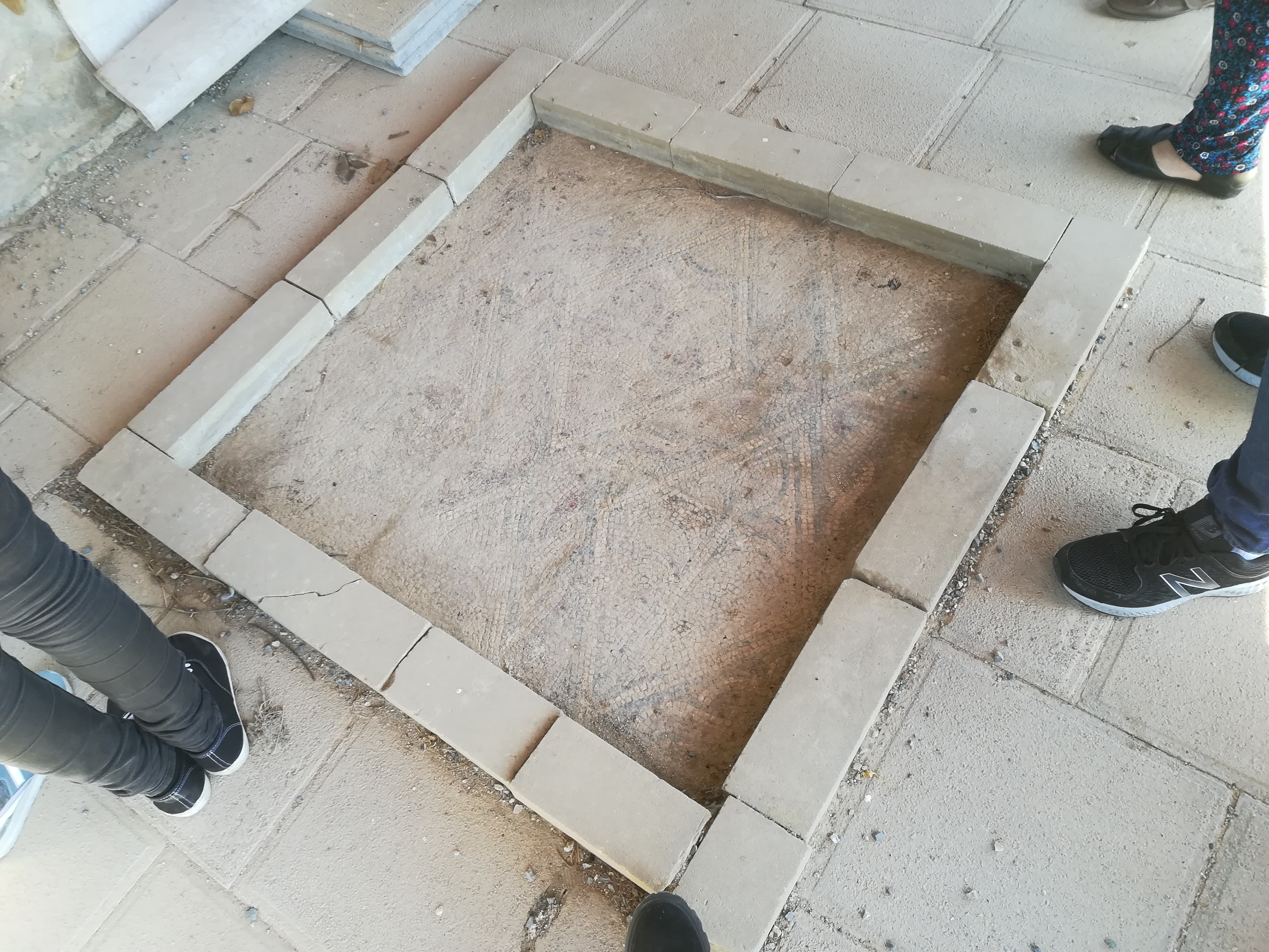 En aquesta fotografia podem veure una petita parc del mosaic de la galeria nord per a fer-nos-en una idea.